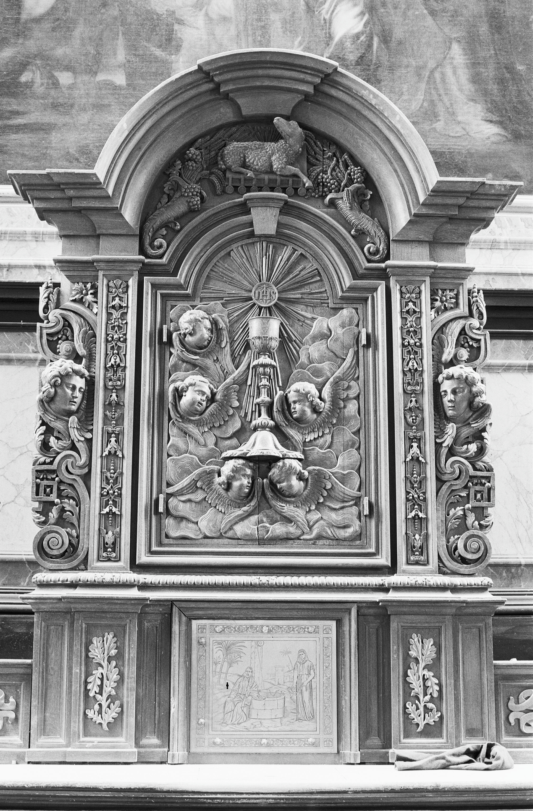 Sint Elisabethkerk: expositietroon hoofdaltaar